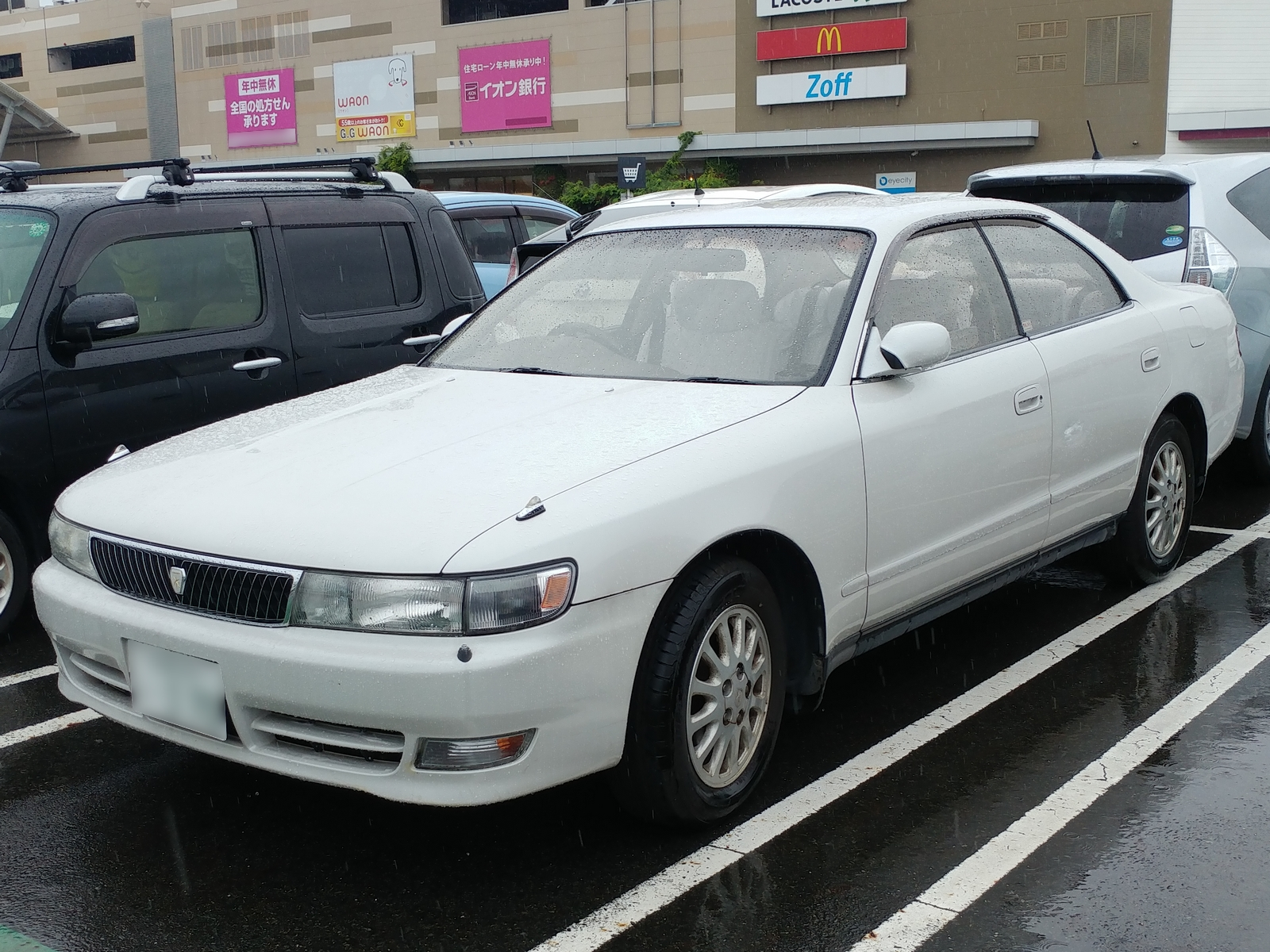 チェイサー 2.5アバンテG（後期型）